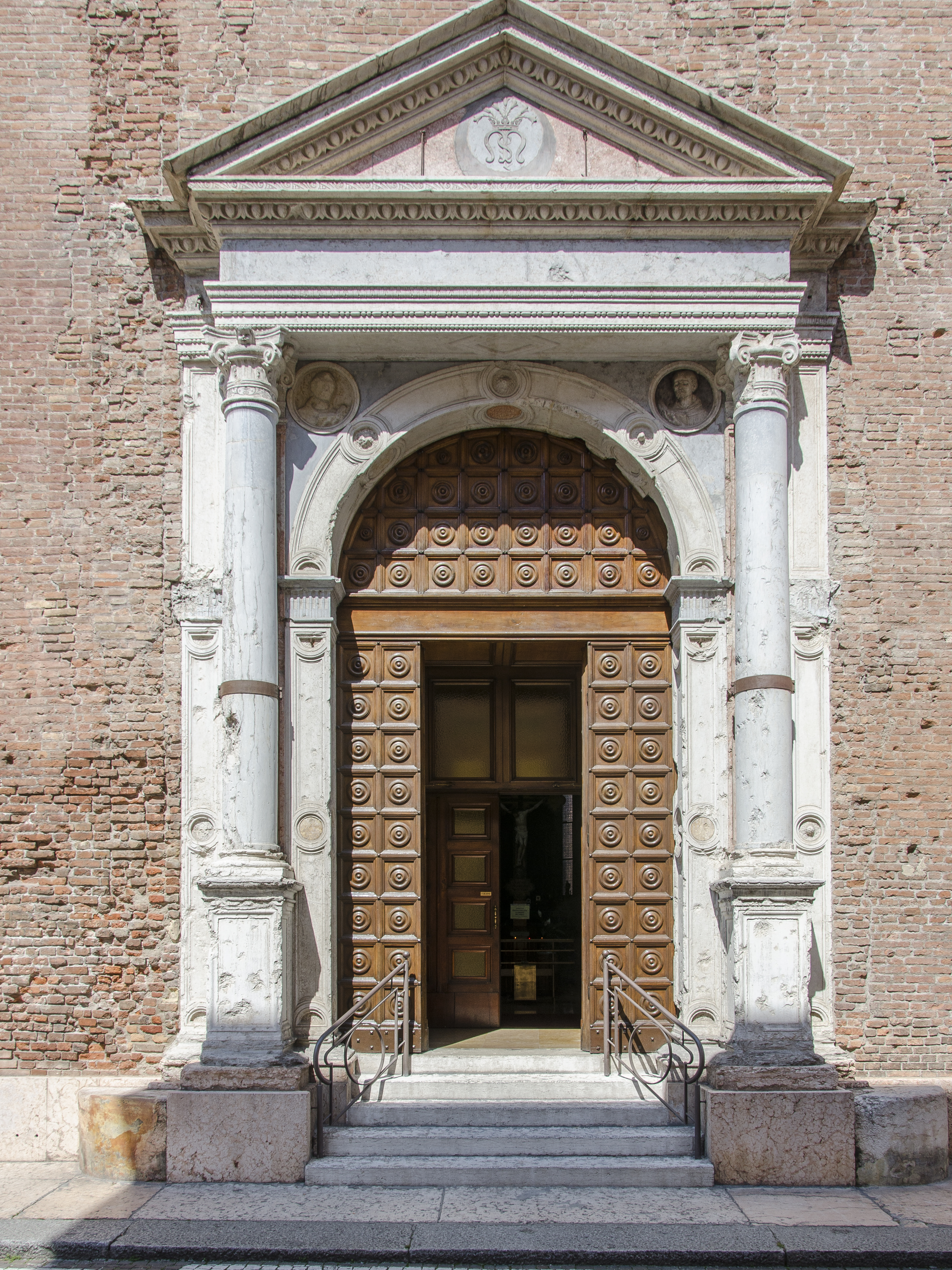 Esterno della chiesa di Santa Maria della Scala, a Verona